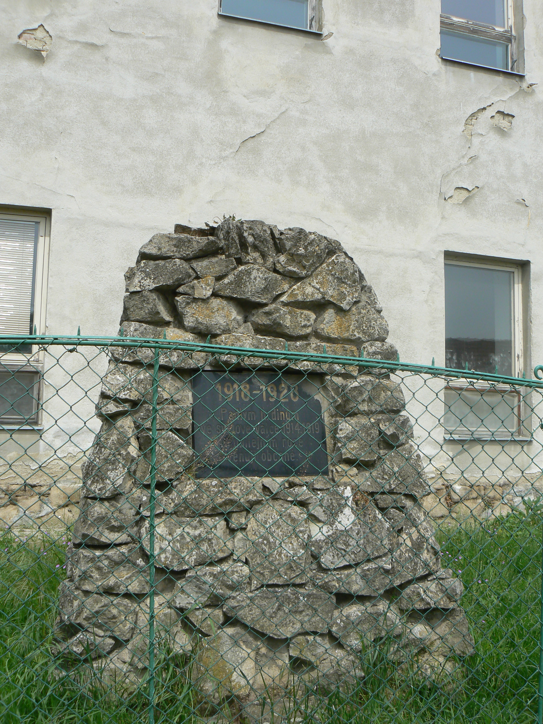 Pomník obětem 1. světové války v Nemoticích, okres Vyškov.